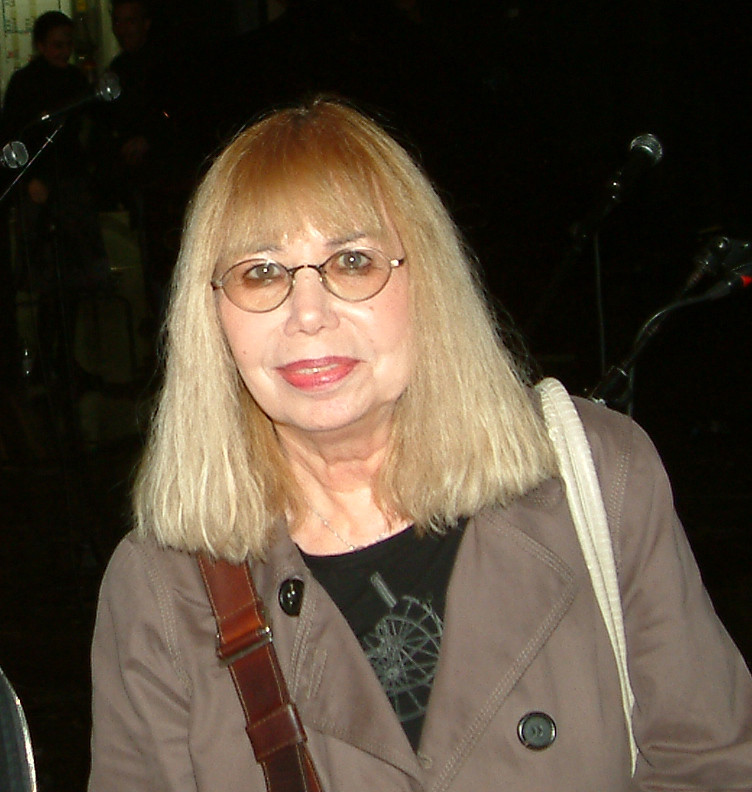 המשוררת רחל שפירא